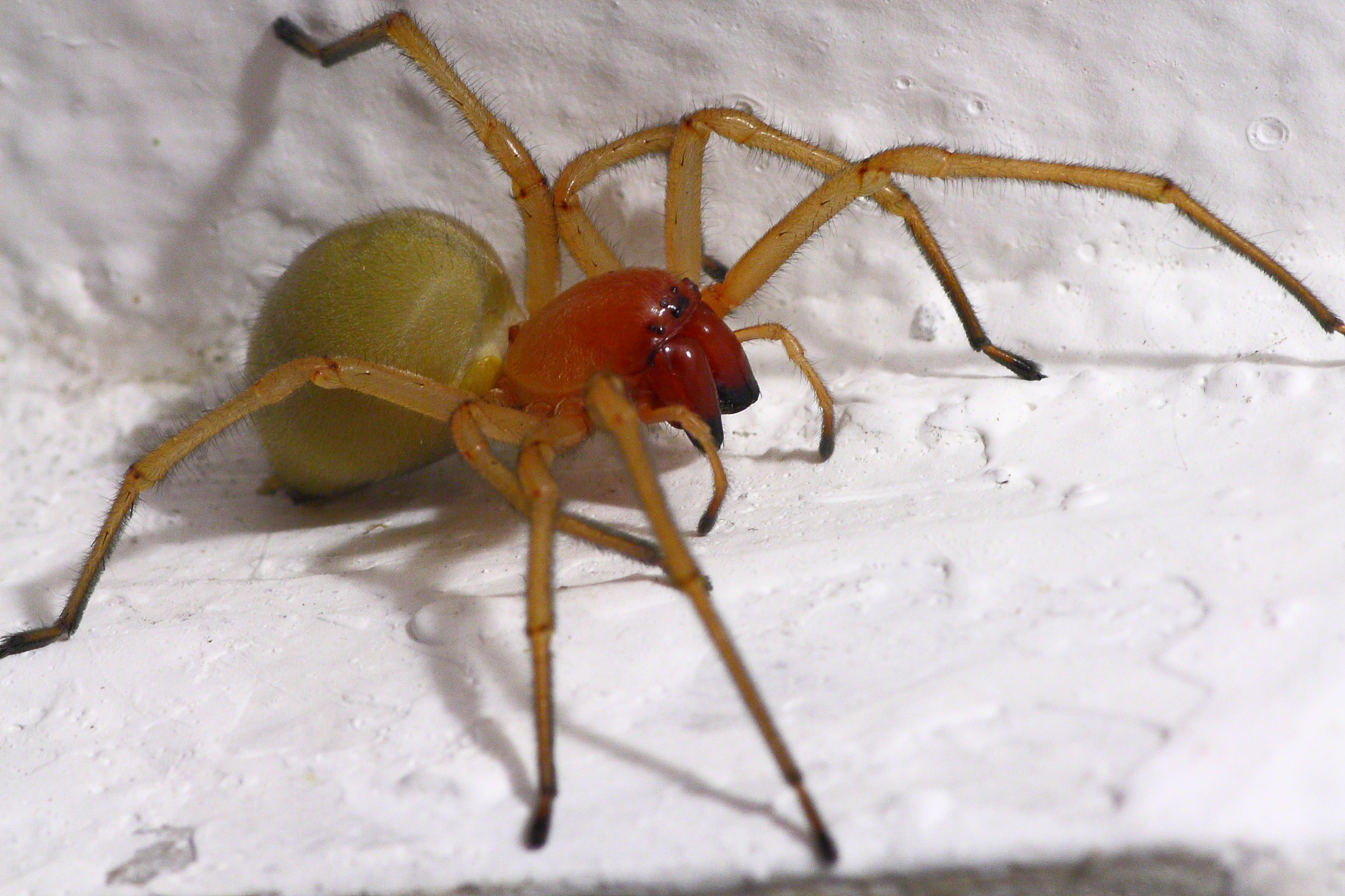 Cheiracanthium punctorium ♀, litorale abruzzese